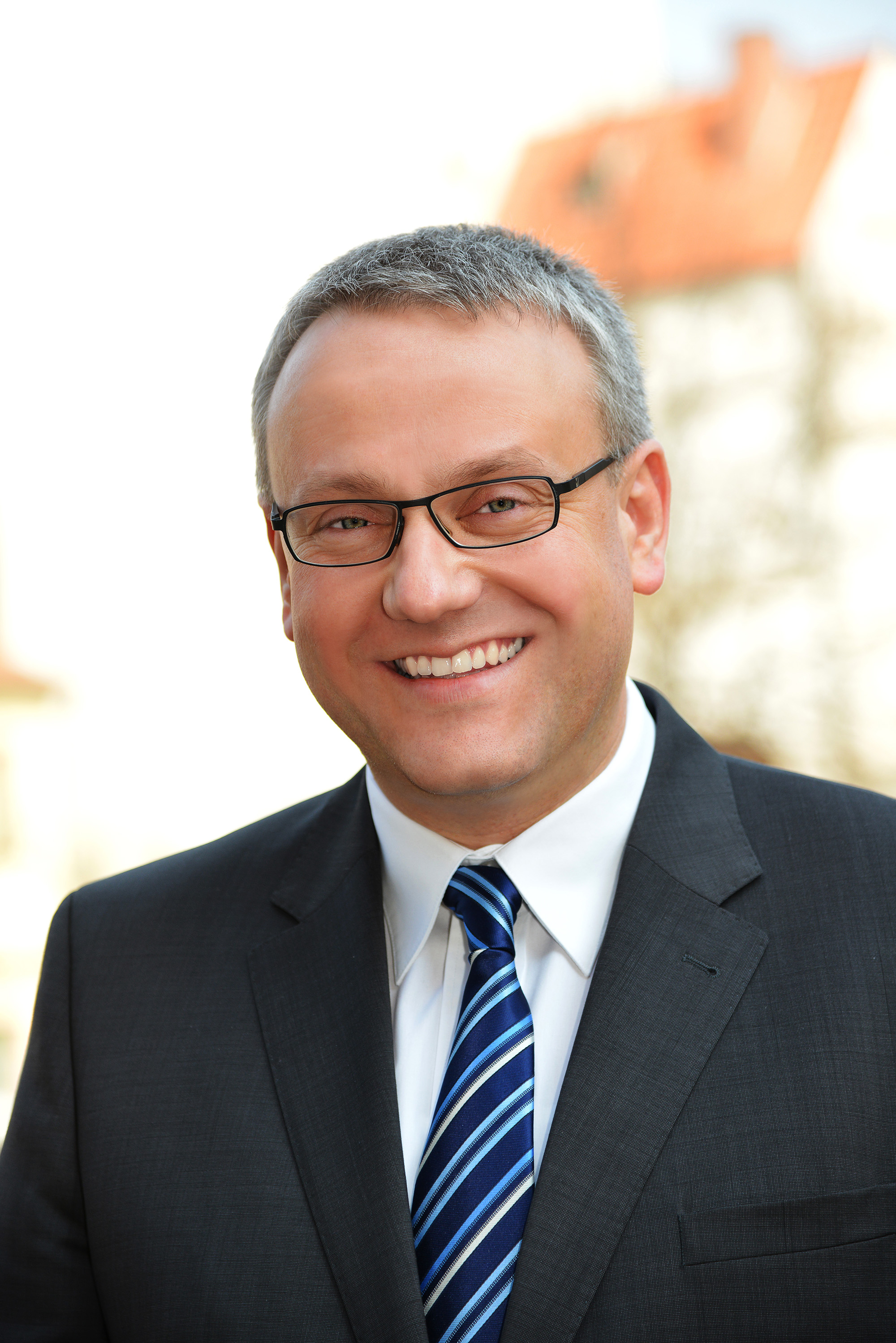 Götz Ulrich 2014 im Landratswahlkampf im Burgenlandkreis.